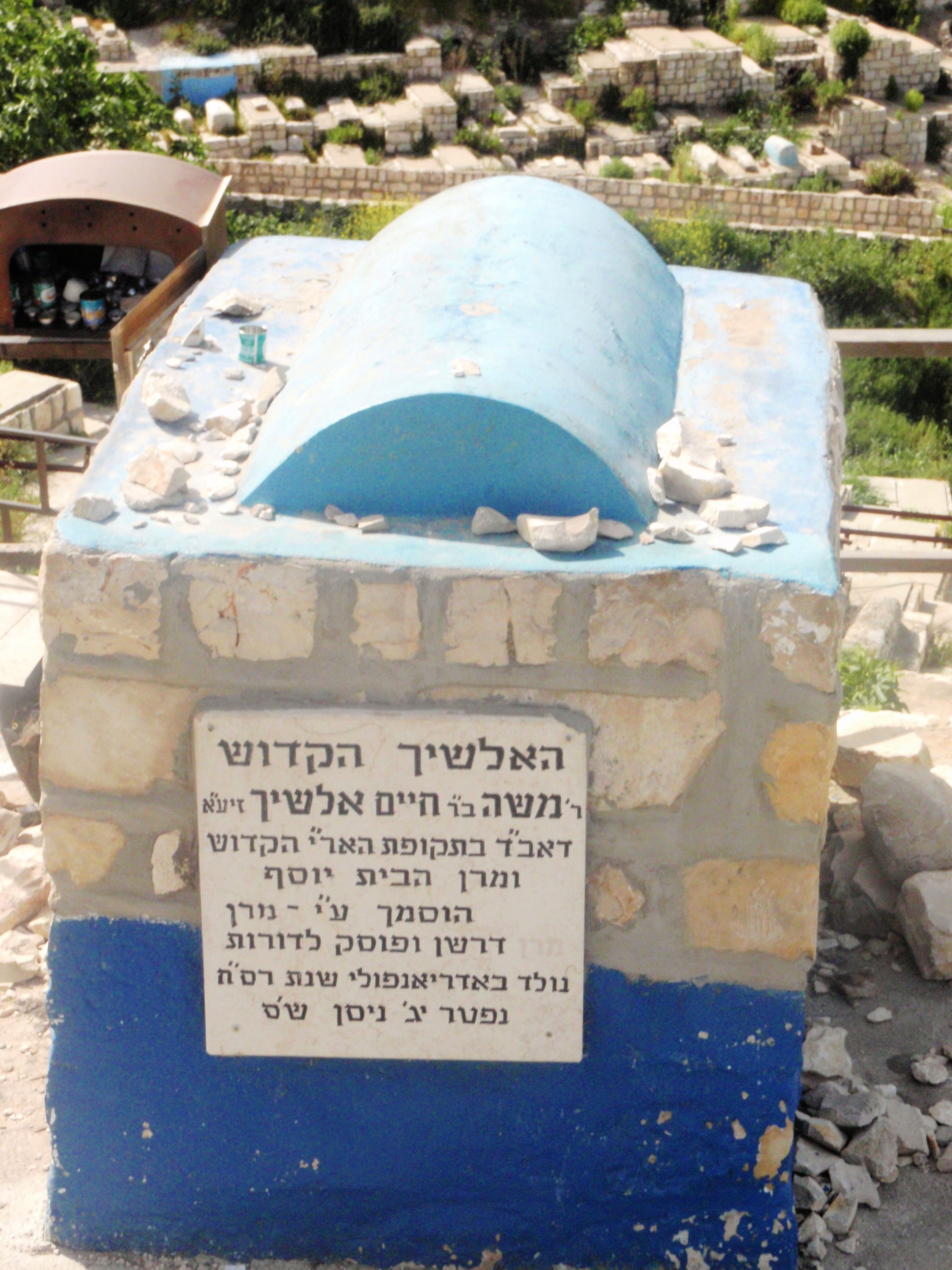 ציון האלשיך הקדוש